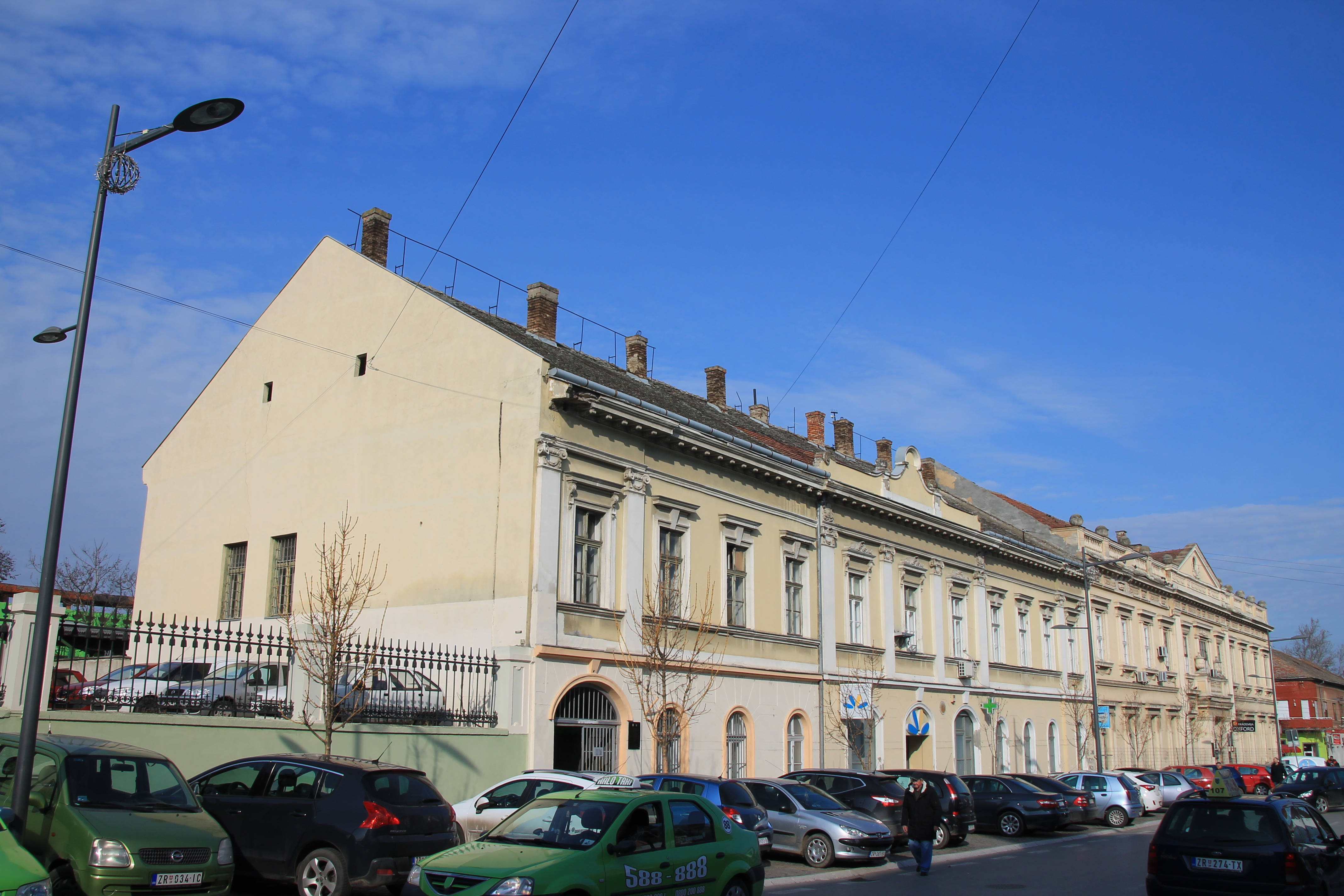 Staro jezgro Zrenjanina